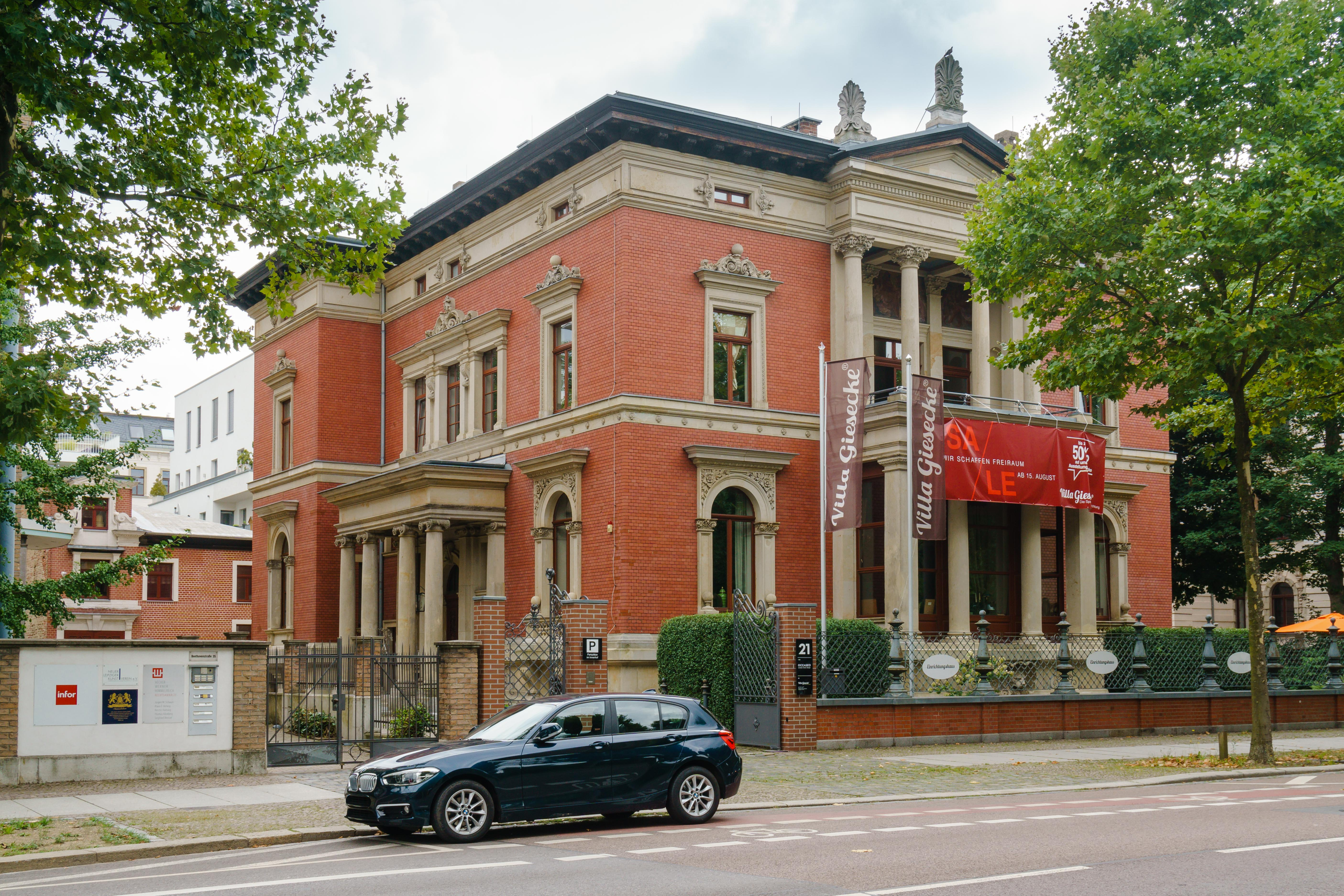 Villa Georg Giesecke, Karl-Tauchnitz-Straße 21 in Leipzig (Musikviertel). Architekt: Max Hasak (1856–1934)